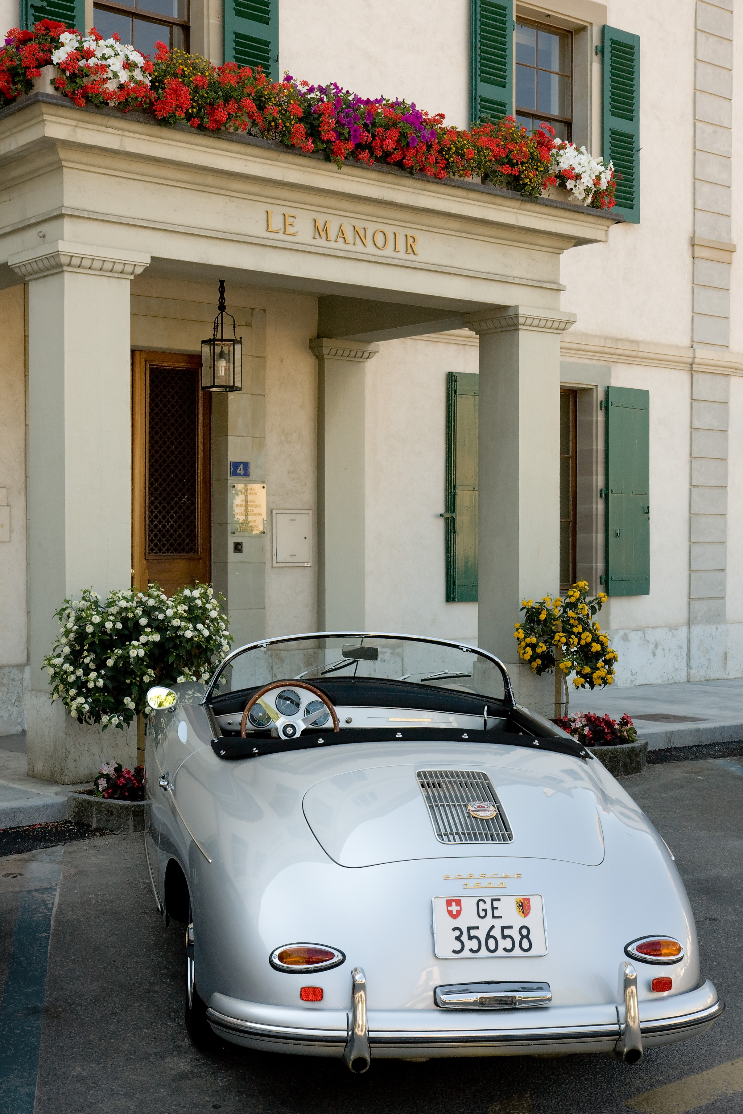 Porsche 356 1600 vor einem Herrenhaus in Cologny, Schweiz